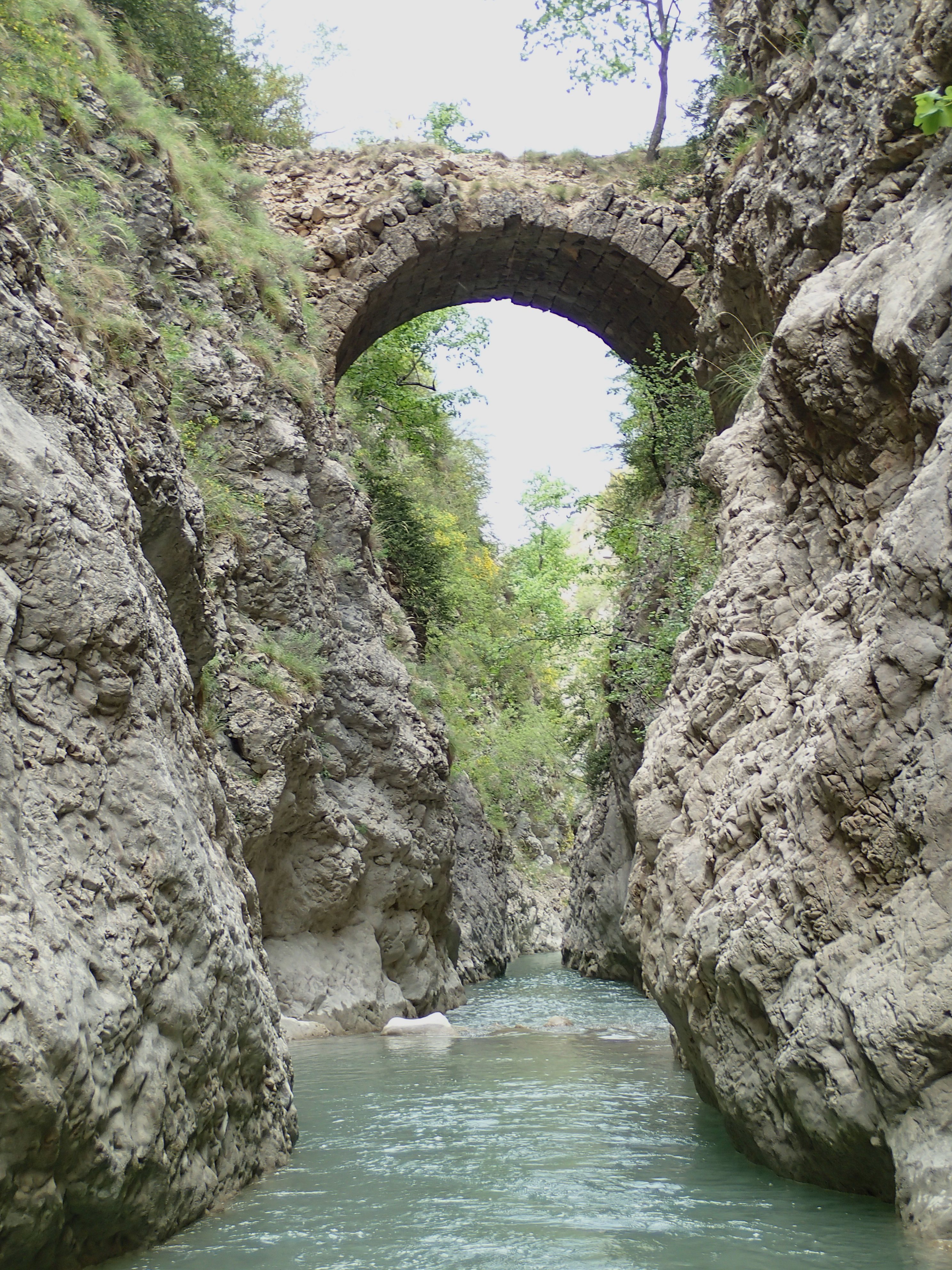 Ancien pont Saint-Joseph, à Annot, sur la Galange, près de l'actuel (2016) pont de la route nationale 202.